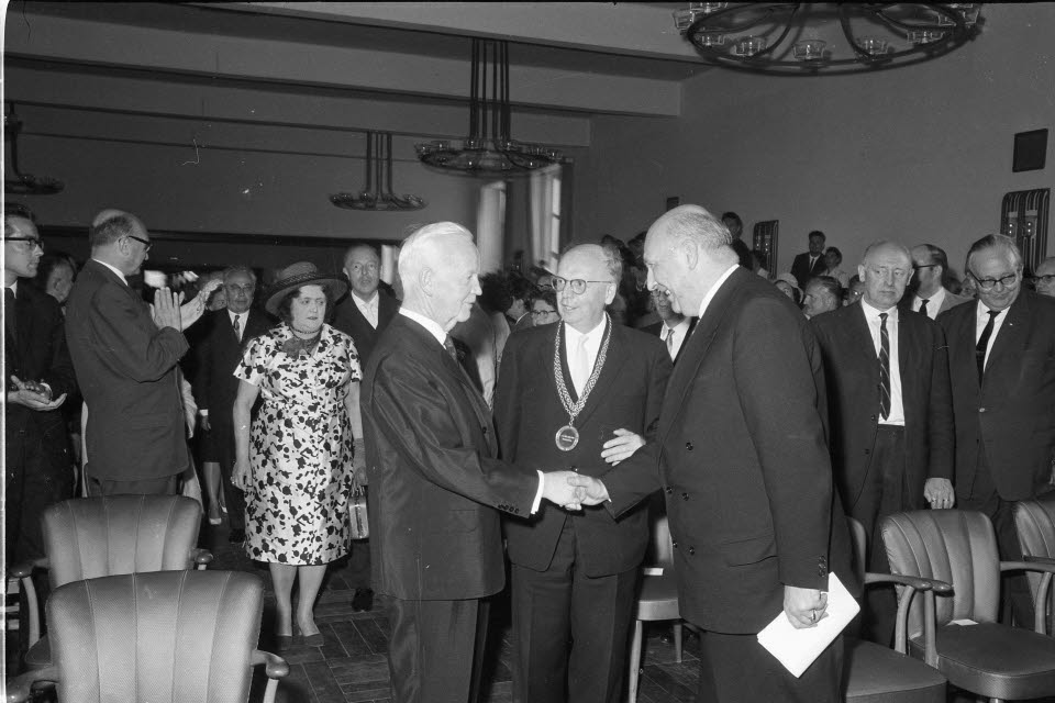 bei der Christian-Albrechts-Universität (CAU). Vorstellung des Akademischen Senats. In der Bildmitte Bundespräsident Heinrich Lübke (1.v.l.), CAU-Rektor Prof. Dr. Herbert Schlenger (2.v.l.) und Prof. Dr. Theodor Schieder (3.v.l.). Im Hintergrund u.a. Ministerpräsident Helmut Lemke.